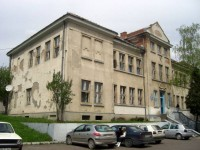 Srednja medicinska škola Doboj